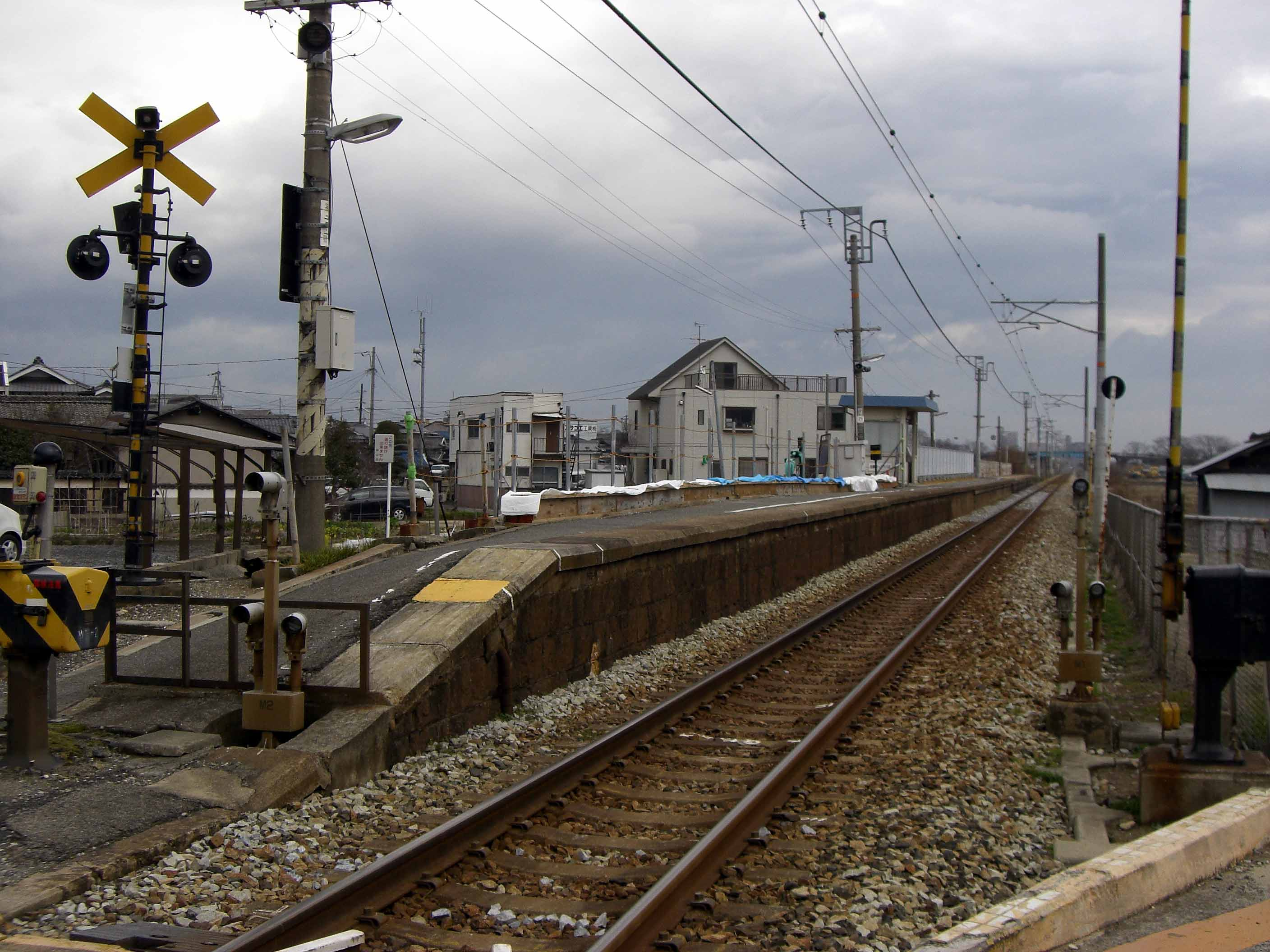 備中箕島駅の構内の様子